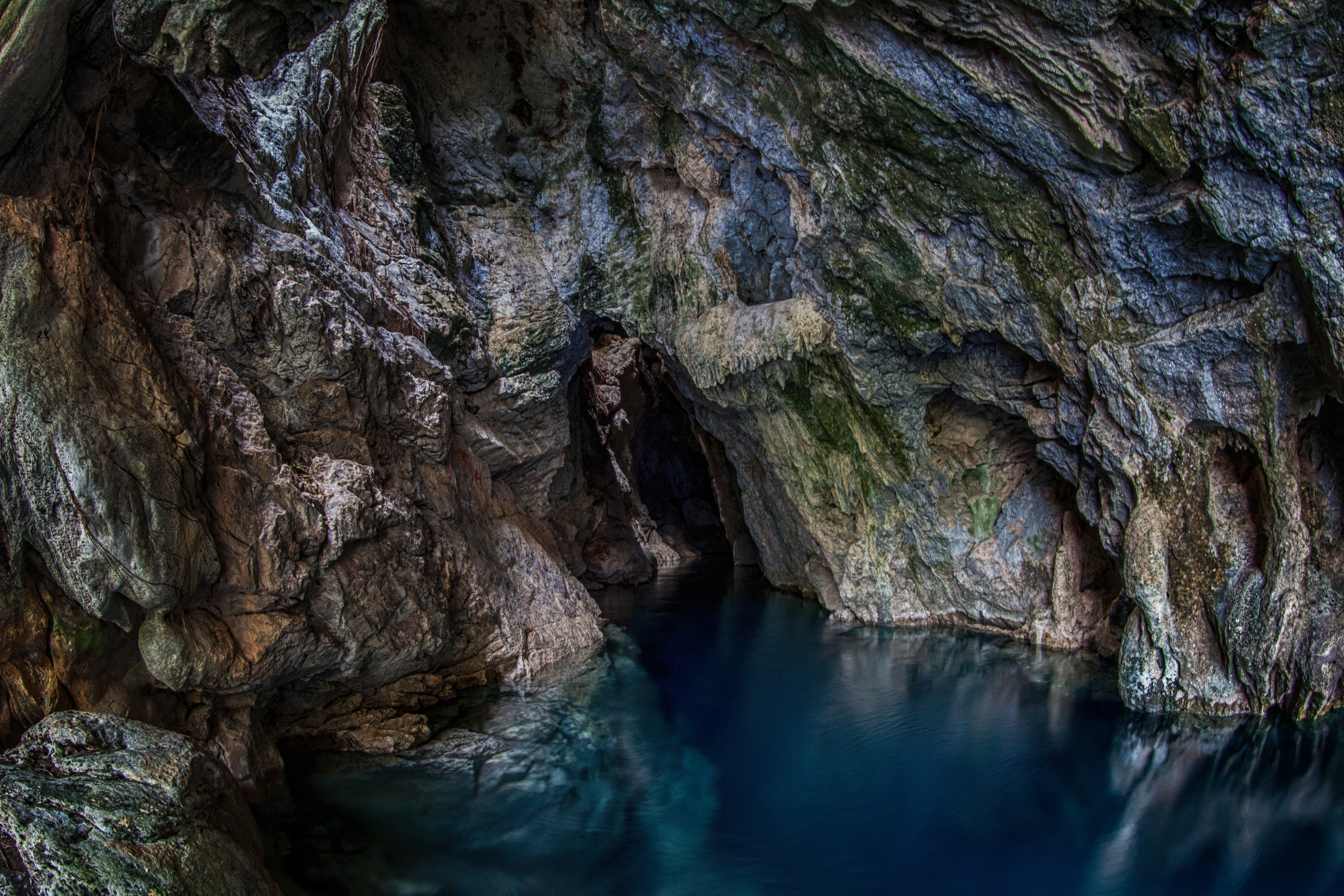 EL Nacimiento, Ciudad Mante, Tamaulipas